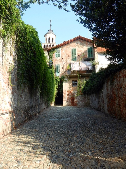 Saluzzo - Salita Malacarne